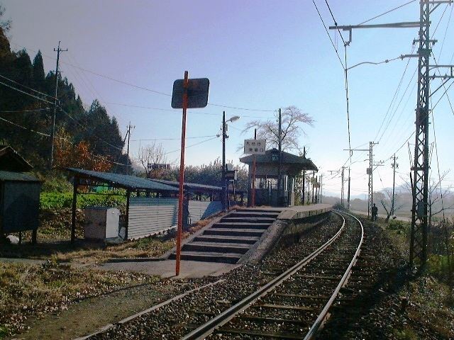 長野電鉄河東線・田上駅のホーム